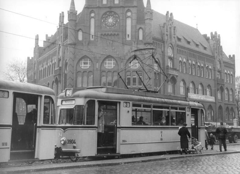 Zentralbild-Krisch Frö-Qu 1.11.1959 Neuer Großraumwagen der BVG UBz. Großraumwagen mit Anhänger der Linie 3 an der Haltestelle Möllendorffstrasse am Rathaus Lichtenberg.